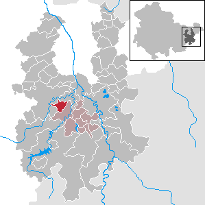 Schömberg in Thuringia - District Greiz